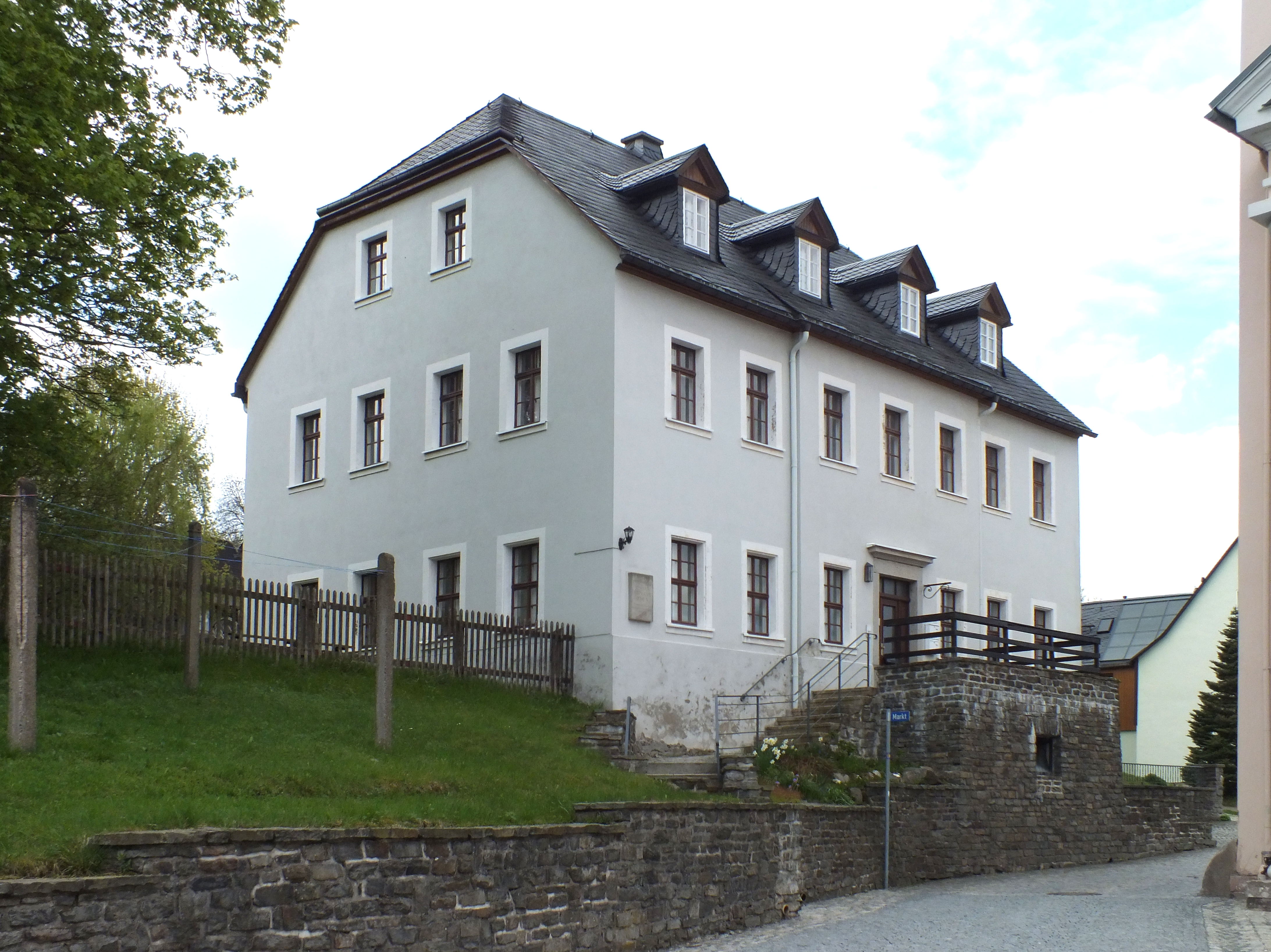 Nicolaikirche Grünhain, benachbartes Pfarrhaus